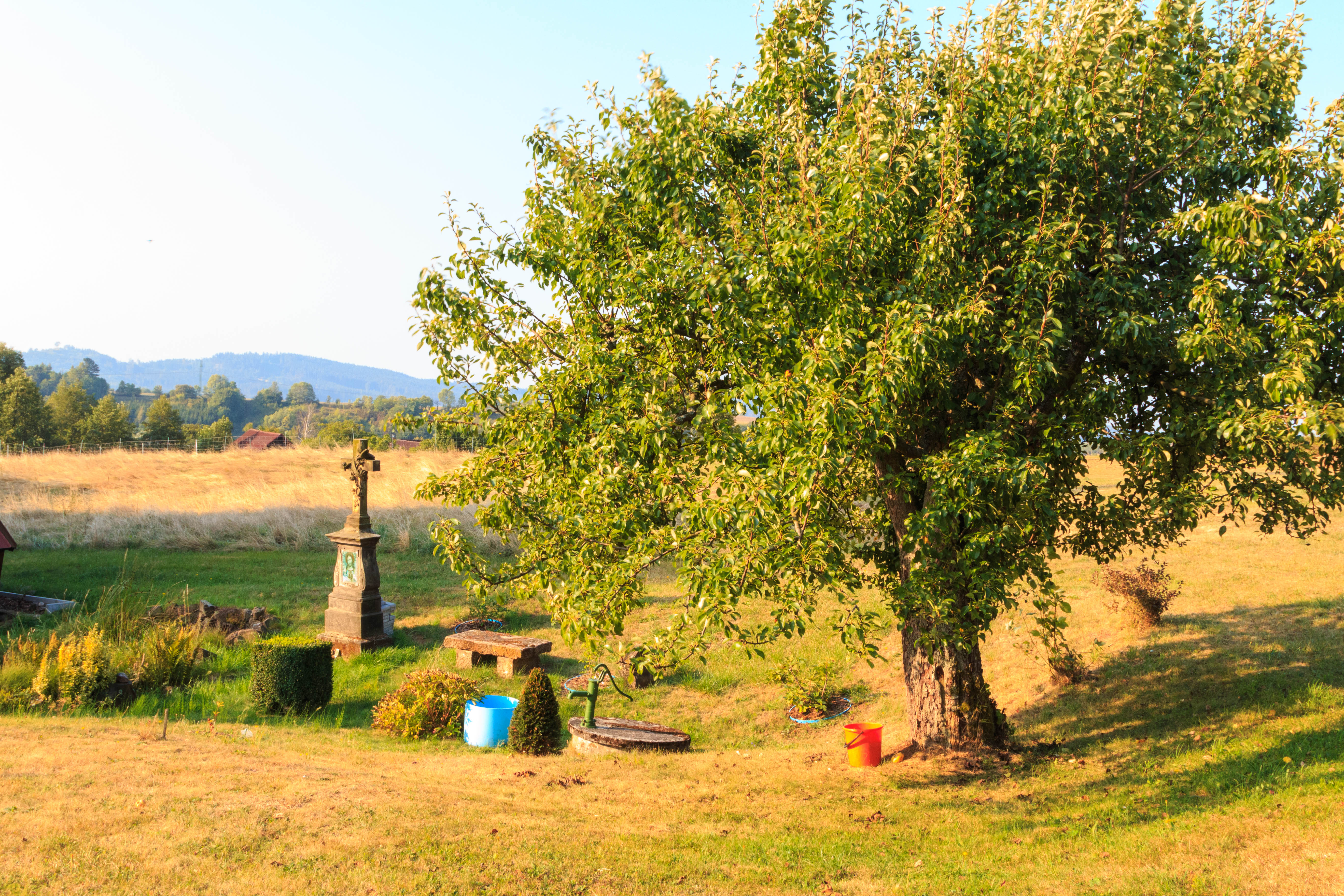 Nový Svět u Kněžnice - křížek